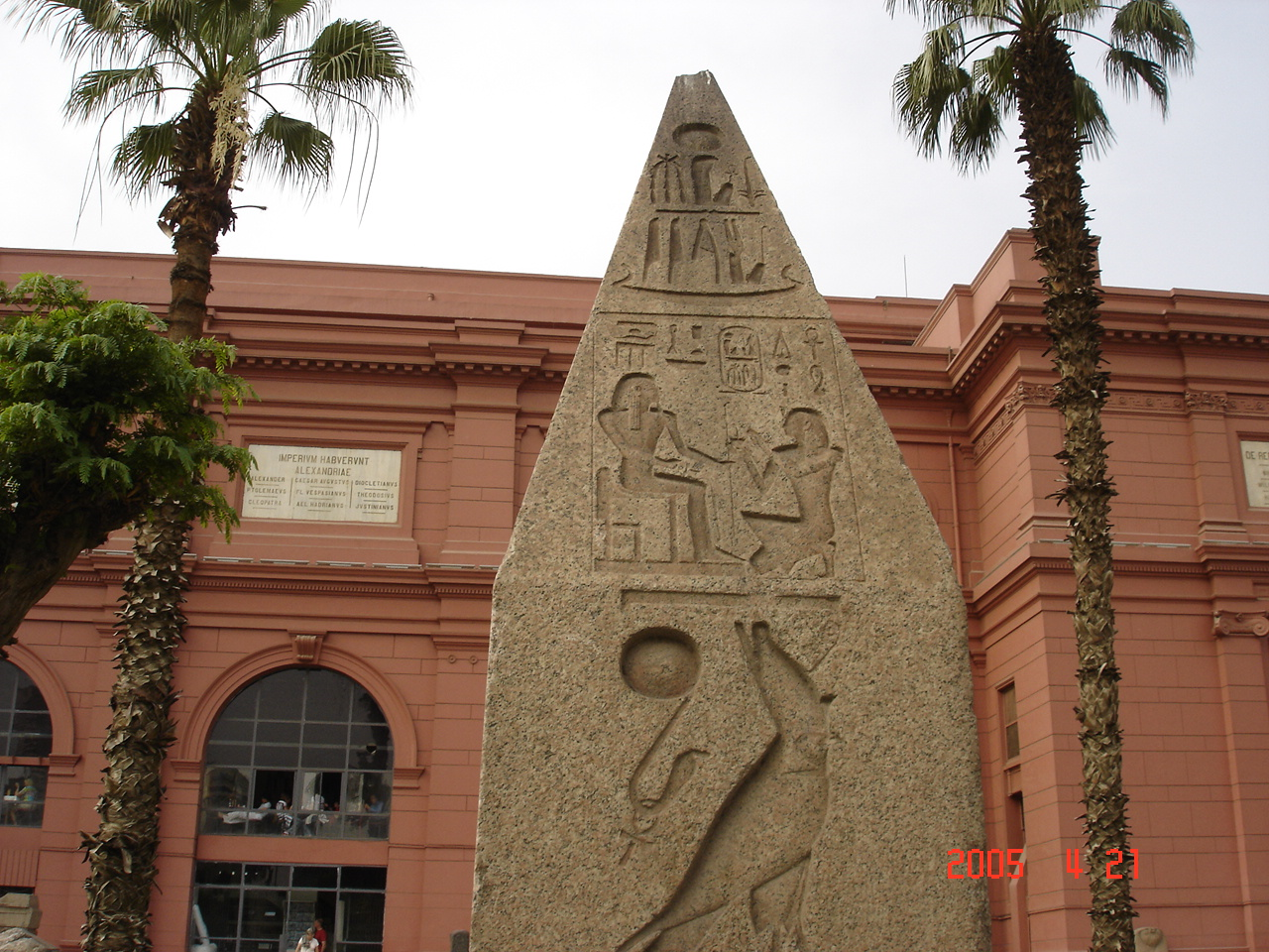 Obeliszk csúcsa II. Ramszesz nevével (Egyiptom, Kairó, Tahrír tér, Múzeum kert)